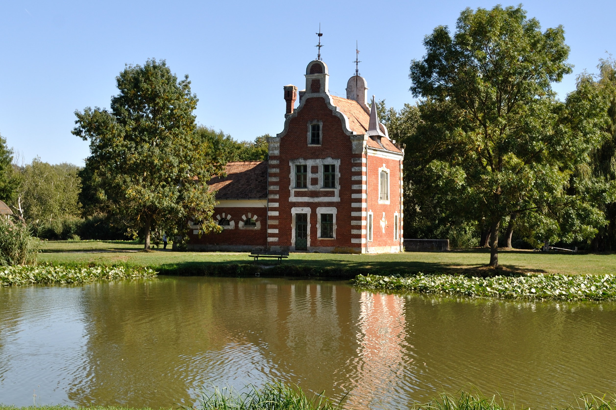 Hollandi-ház (Dég, Hunyadi János út 11. (kastélypark)) This is a photo of a monument in Hungary, Identifier: 3601